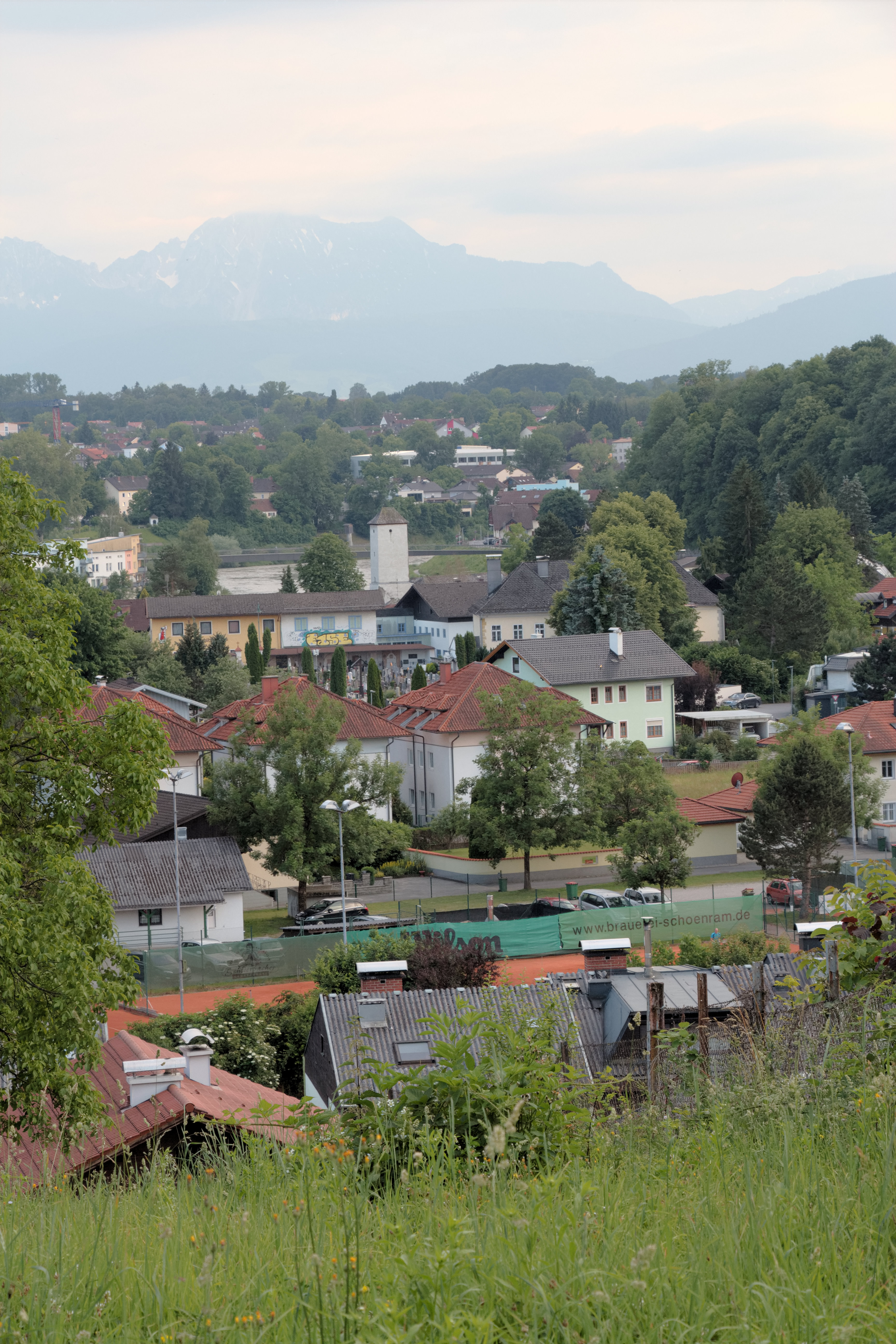 Oberndorf bei Salzburg (Bezirk Salzburg-Umgebung): Teilansicht der Stadtgemeinde vom Ortsteil Ziegelhaiden gesehen; im Hintergrund: Teilansicht der bayrischen Stadtgemeinde Laufen